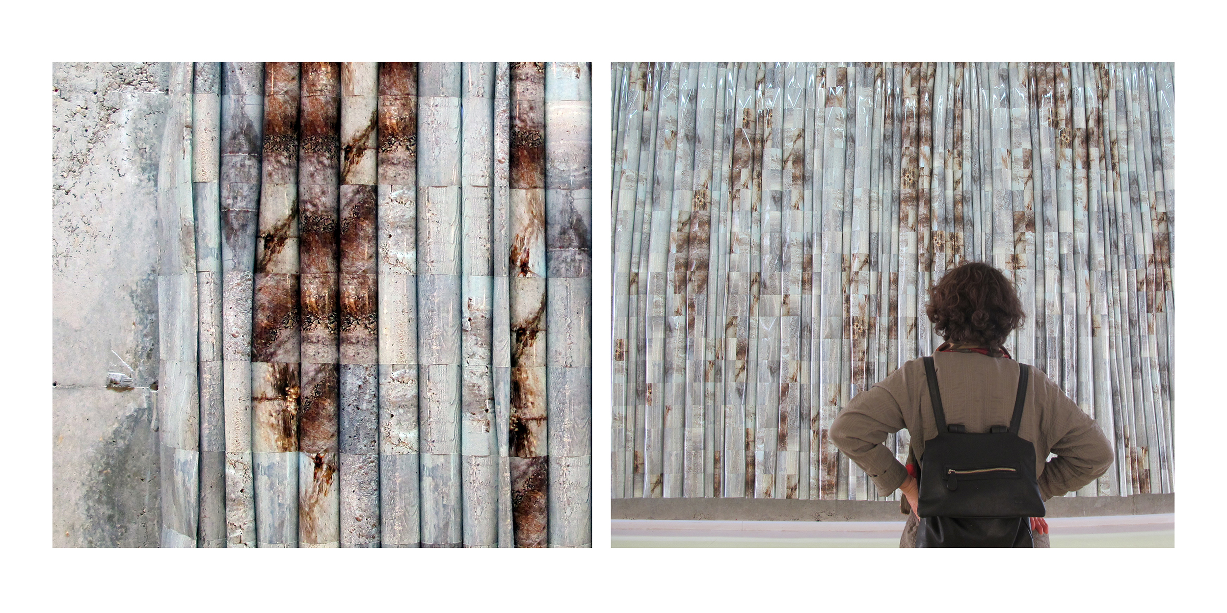 מיצב צילומי ייעודי לחלל, מראה הצבה, 2015 4000 צילומים שזורים של קיר הבטון מוצבים כווילון בגודל 3.5x10.5 מטר על קיר הבטון מסתירים וחושפים אותו בו זמנית. הוצג בתערוכה מבט פנימי, באוצרות איה לוריא, מוזיאון הרצליה לאמנות עכשווית.